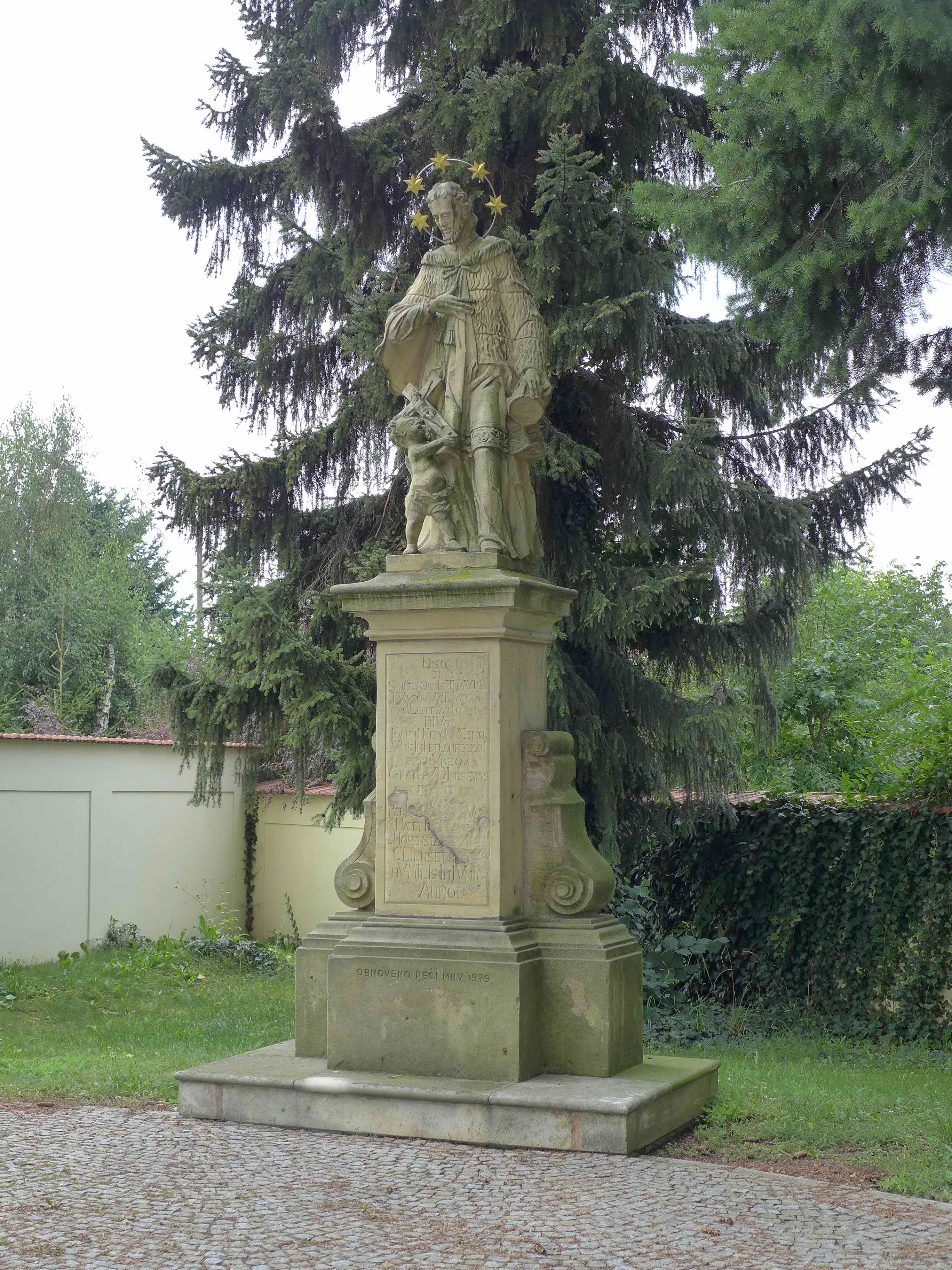 Socha svatého Jana Nepomuckého, hřbitov, Postřelmov.